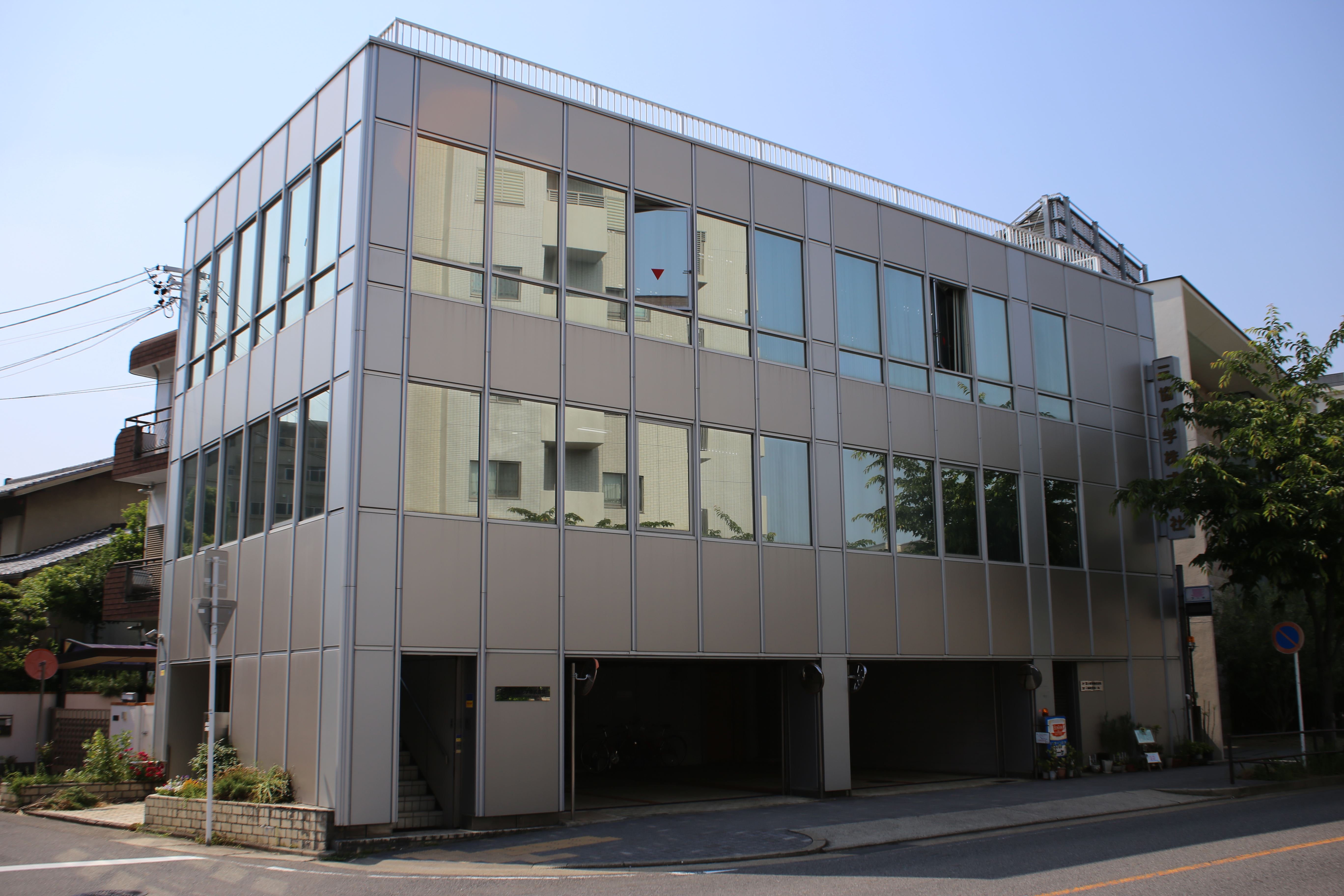 名古屋市東区白壁四丁目の三協化学本社を東側公道南側より撮影